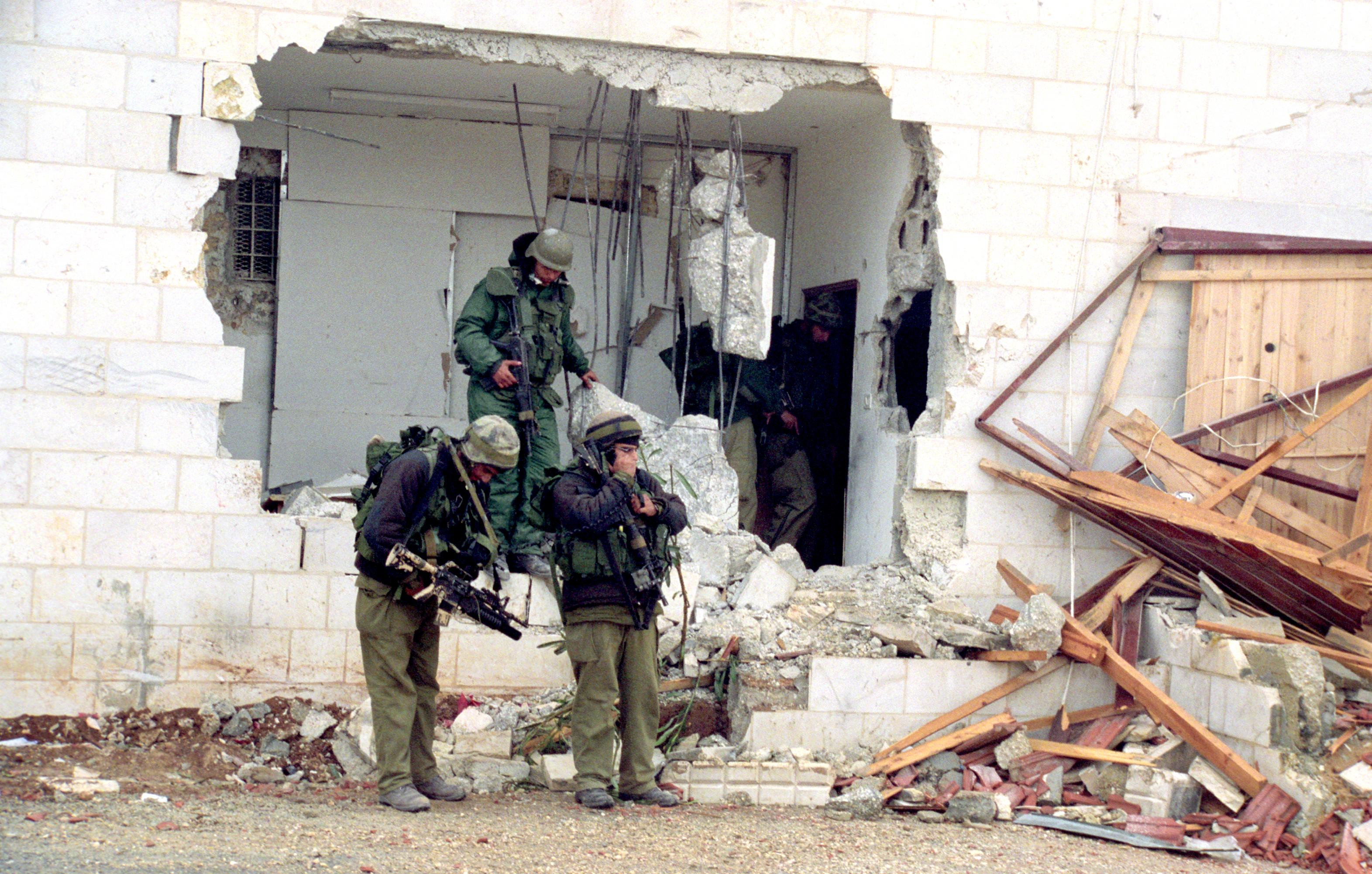 מבצע "חומת מגן" לחיסול והריסת תשתיות הטרור ברשות הפלשתינית על ידי כוחות צה"ל. בצילום, לוחמי צה"ל בפעילות מבצעית ברמאללה.